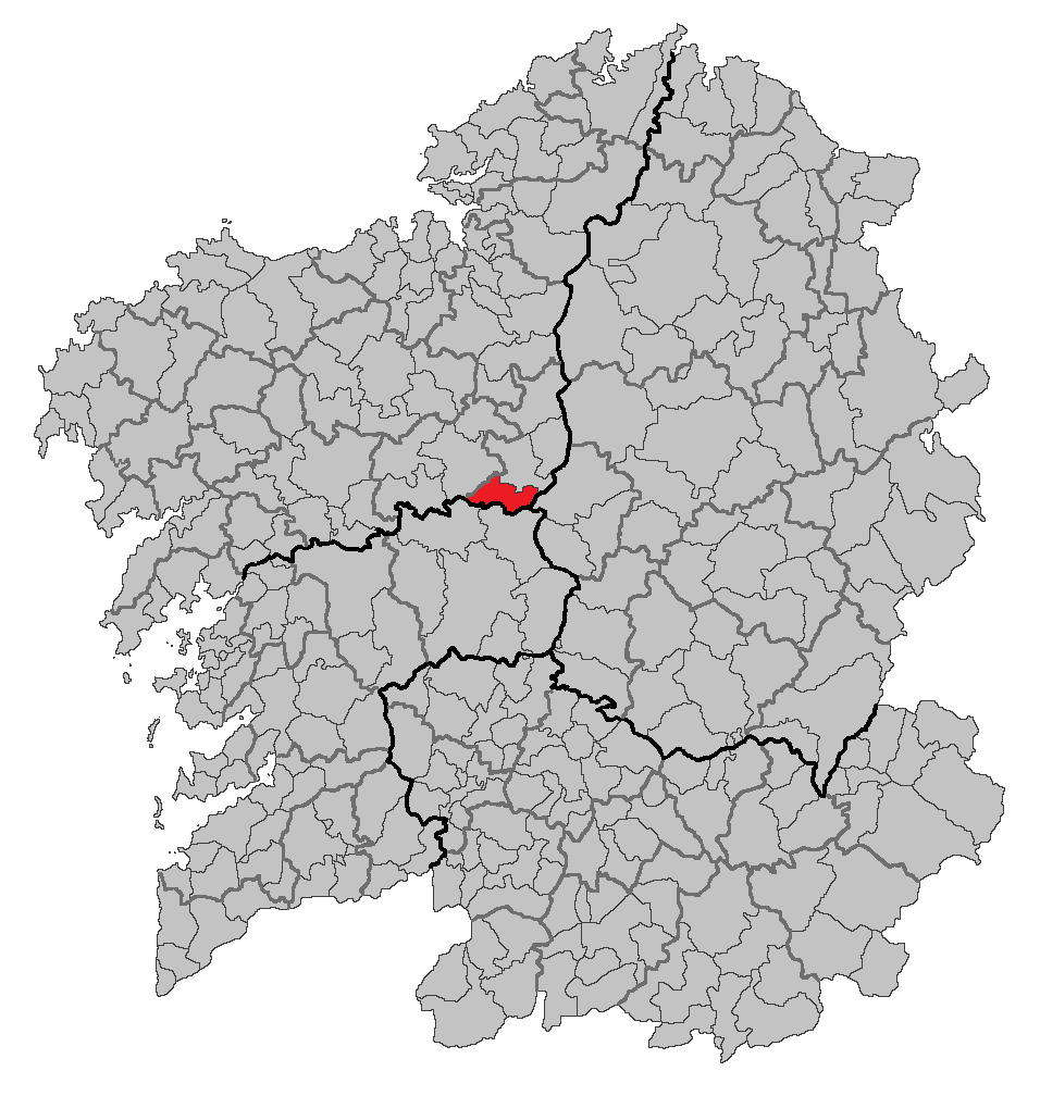 Mapa coa localización do concello de Santiso.